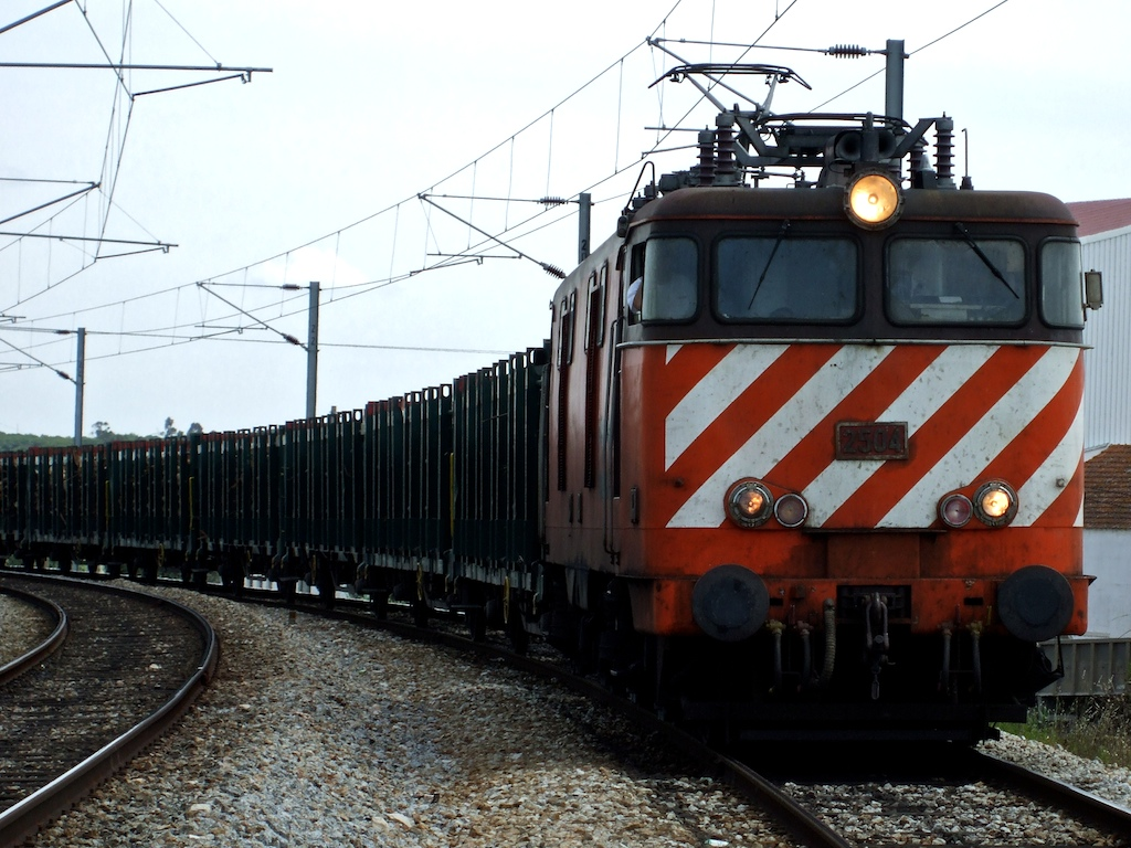 Tipo: Comboio de Transporte de Madeira 61080 [Sabóia - Praias do Sado] Local: Alcácer do Sal [Linha do Sul, PK 77] Data e hora: 3 de Junho de 2008 [14h52] Material: Locomotiva 2504 + 12 vagões CP Kbs